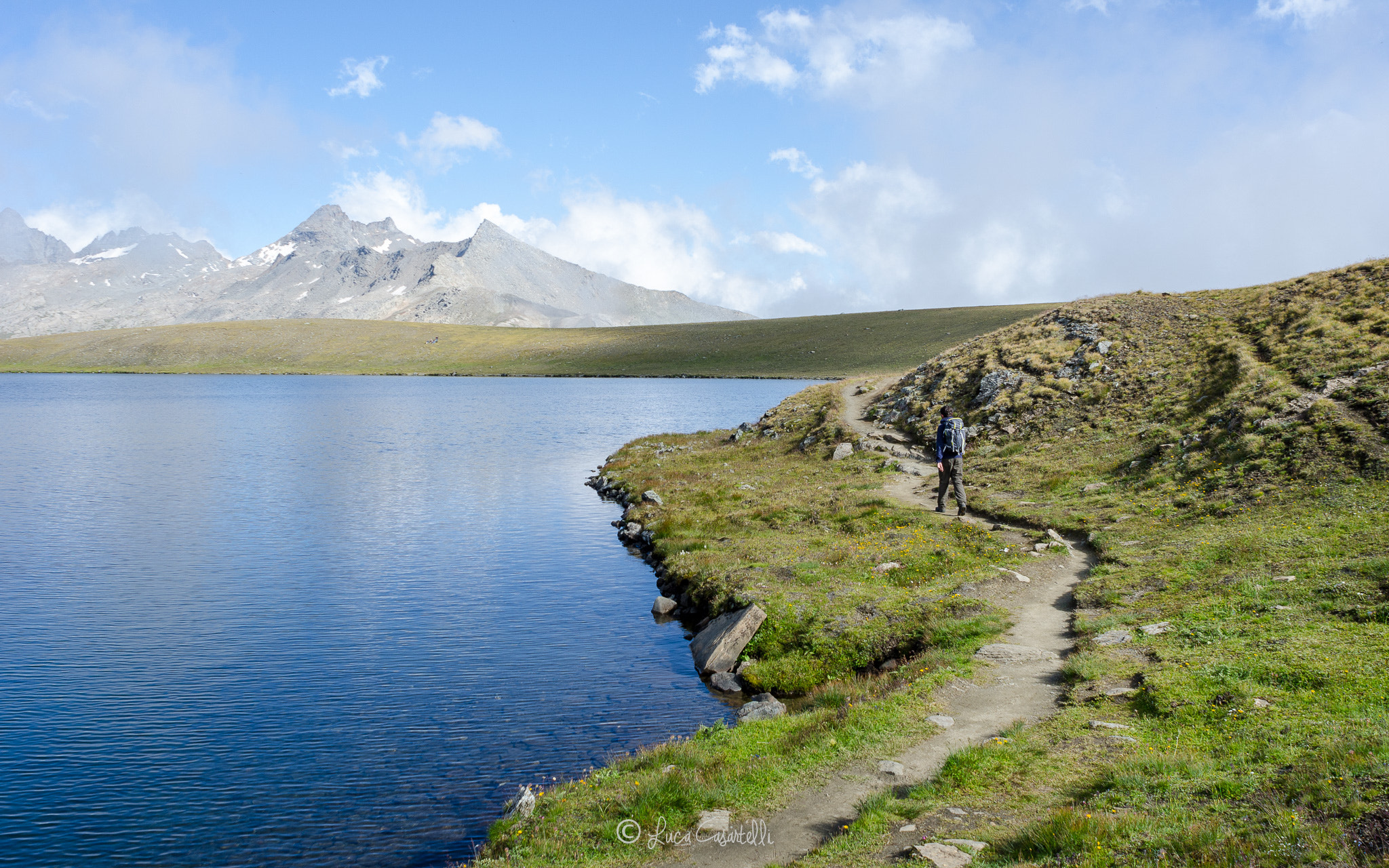 500px provided description: Ceresole Reale [#landscape ,#nature ,#moutains ,#Ceresole Reale ,#Italy ,#Parco Nazionale del Gran Paradiso]